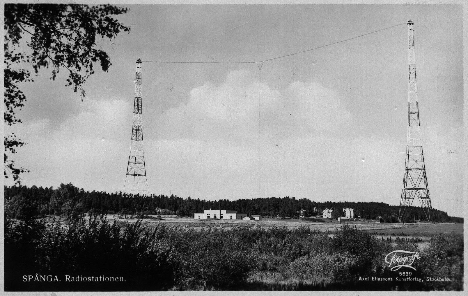 Vykort från 30-talet